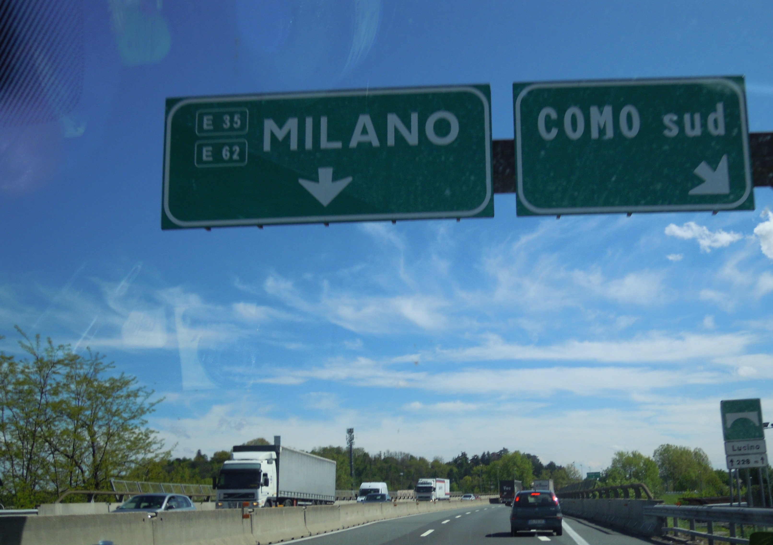 Autoroute italienne A9, sortie Como sud